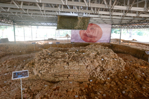 Tapak Ritual Abad Pertama